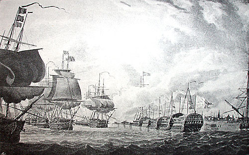 Slaget på reden - Battle og Copenhagen, 2. april 1801